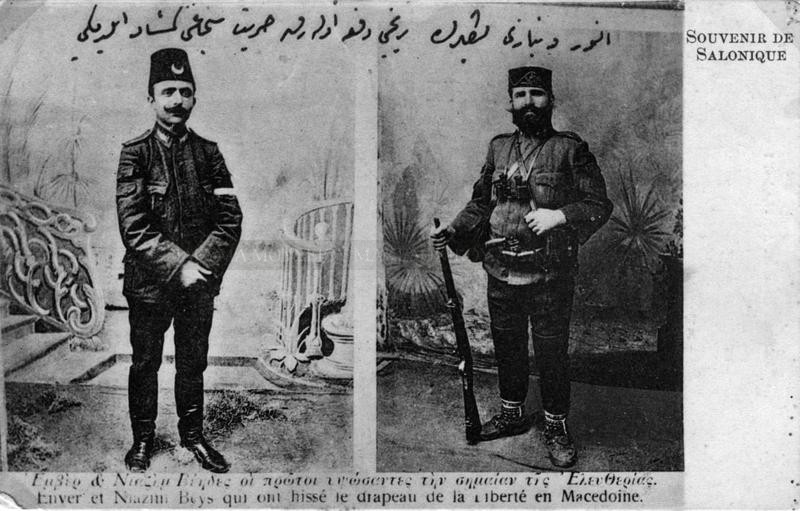 Енвер паша и Ахмед Ниязи Реснели бей.